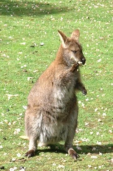 Wallaby de Bennett (Macropus rufogriseus) en captivité, Jardin des Plantes, Paris.